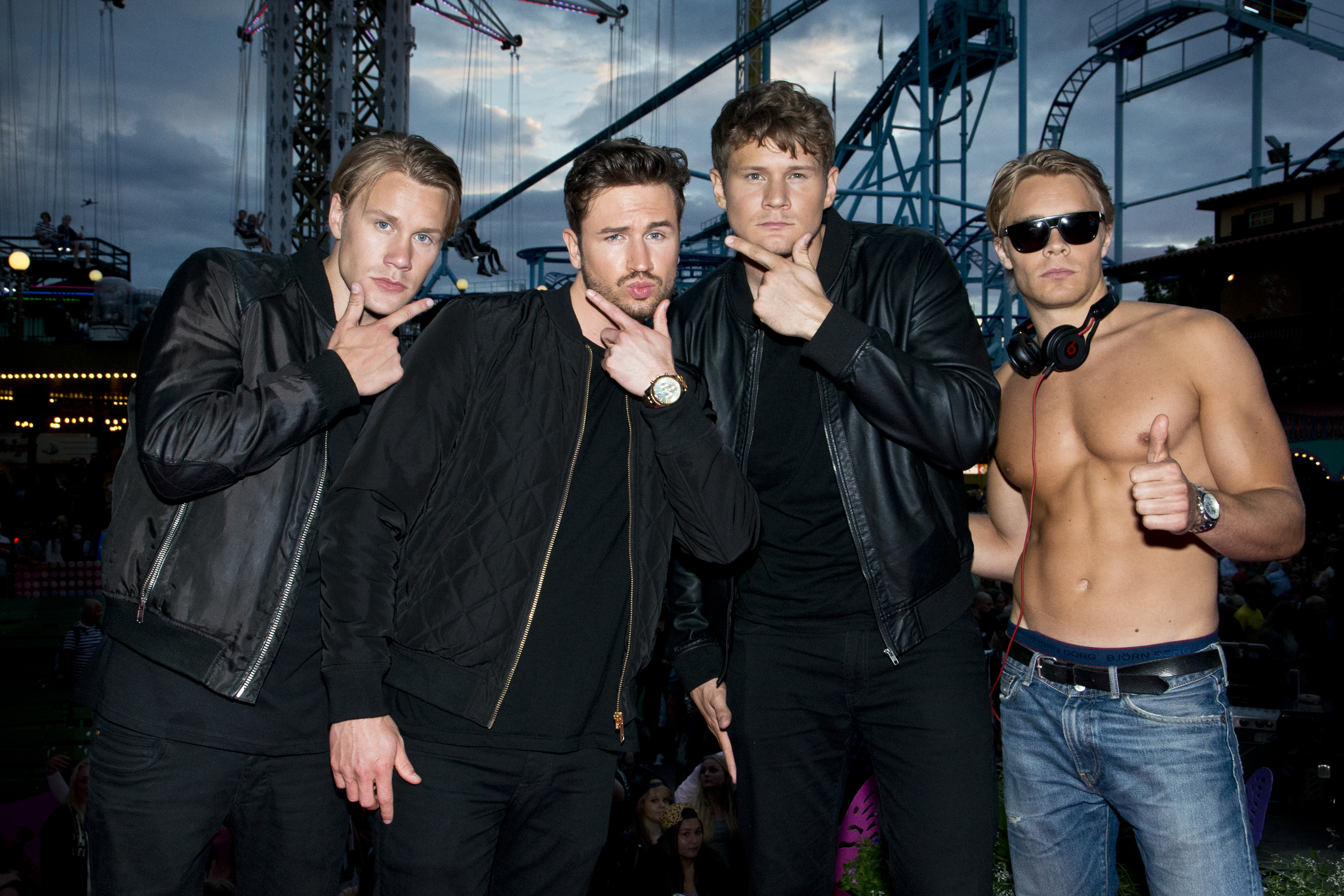 De Vet Du på Sommarkrysset 2015